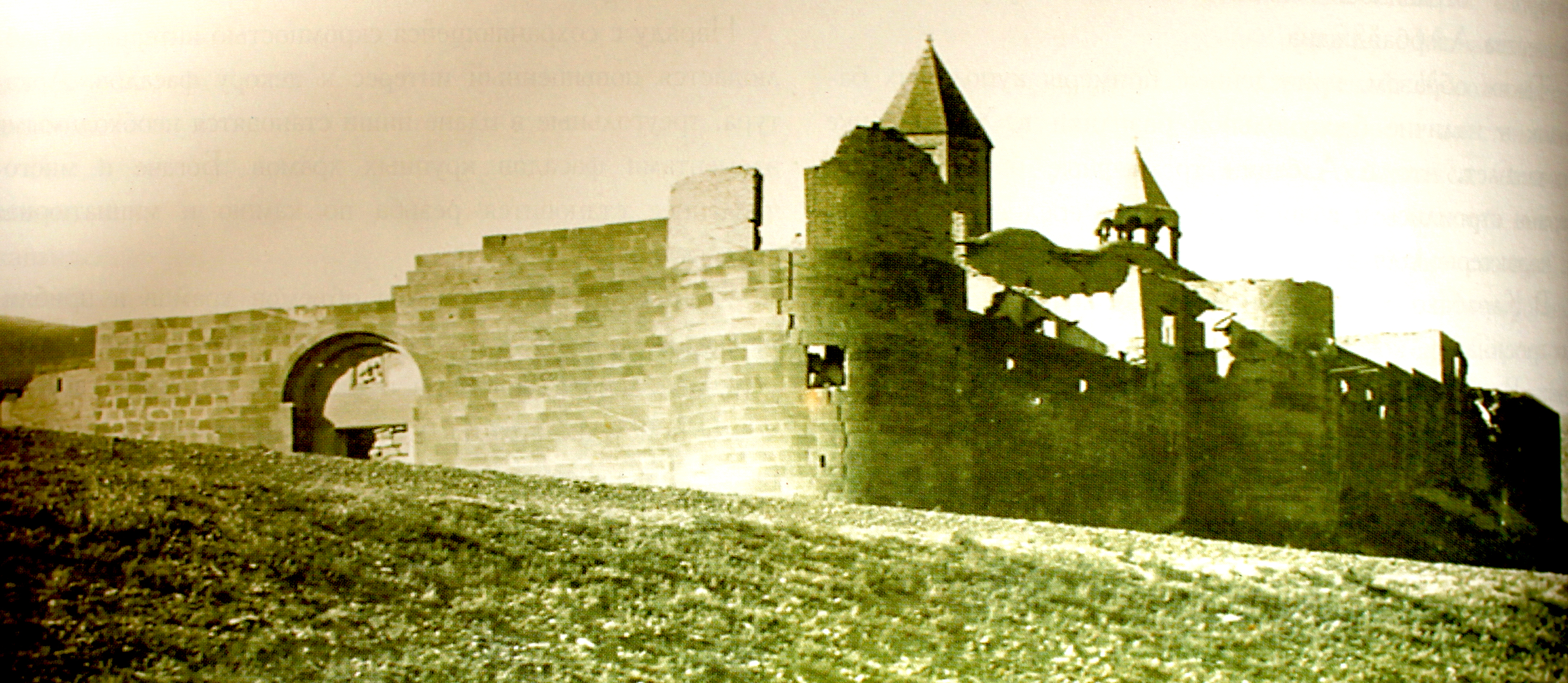 Qızılvəng foto